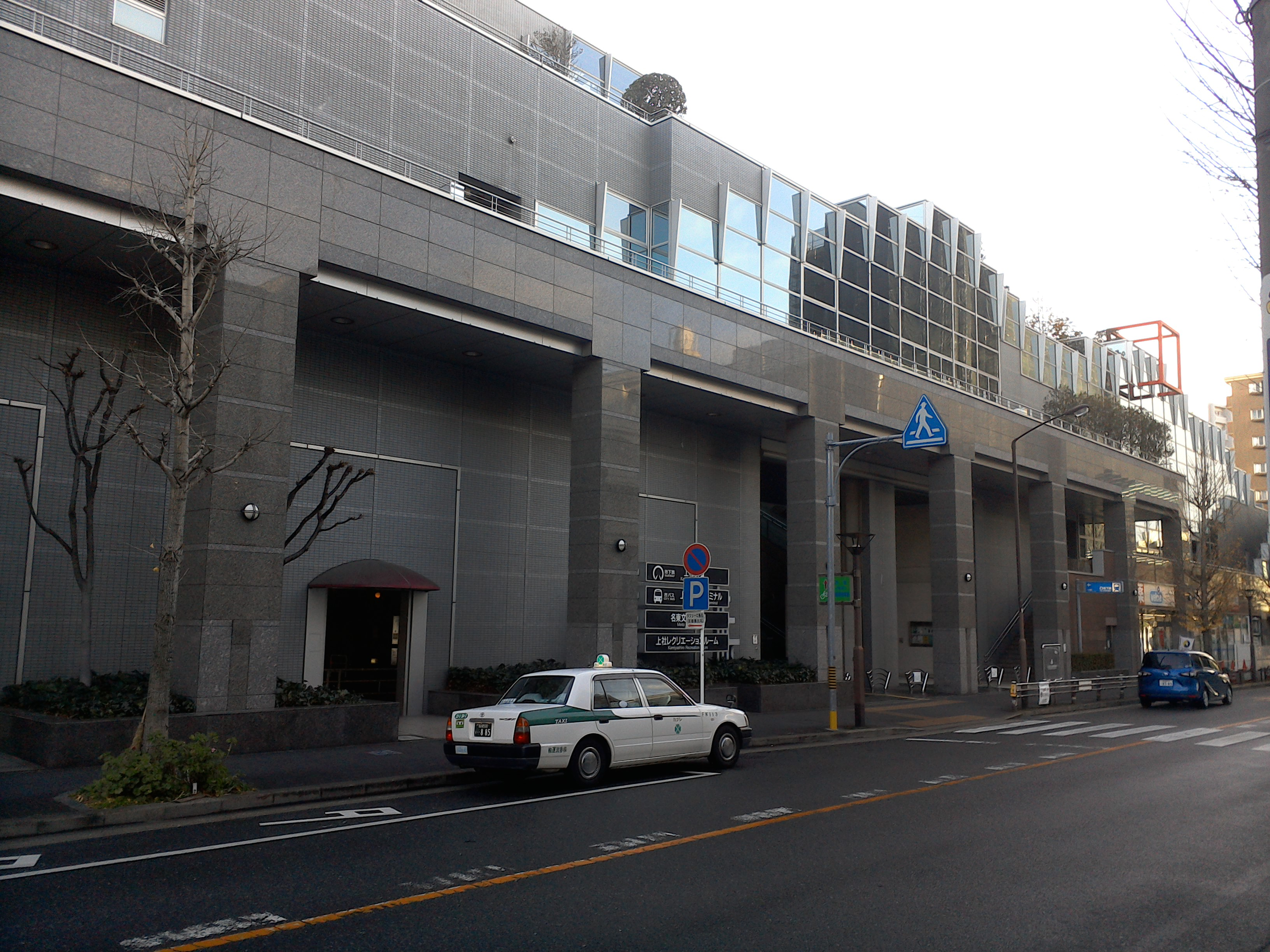 上社駅と直結している上社ターミナルビルの全景。